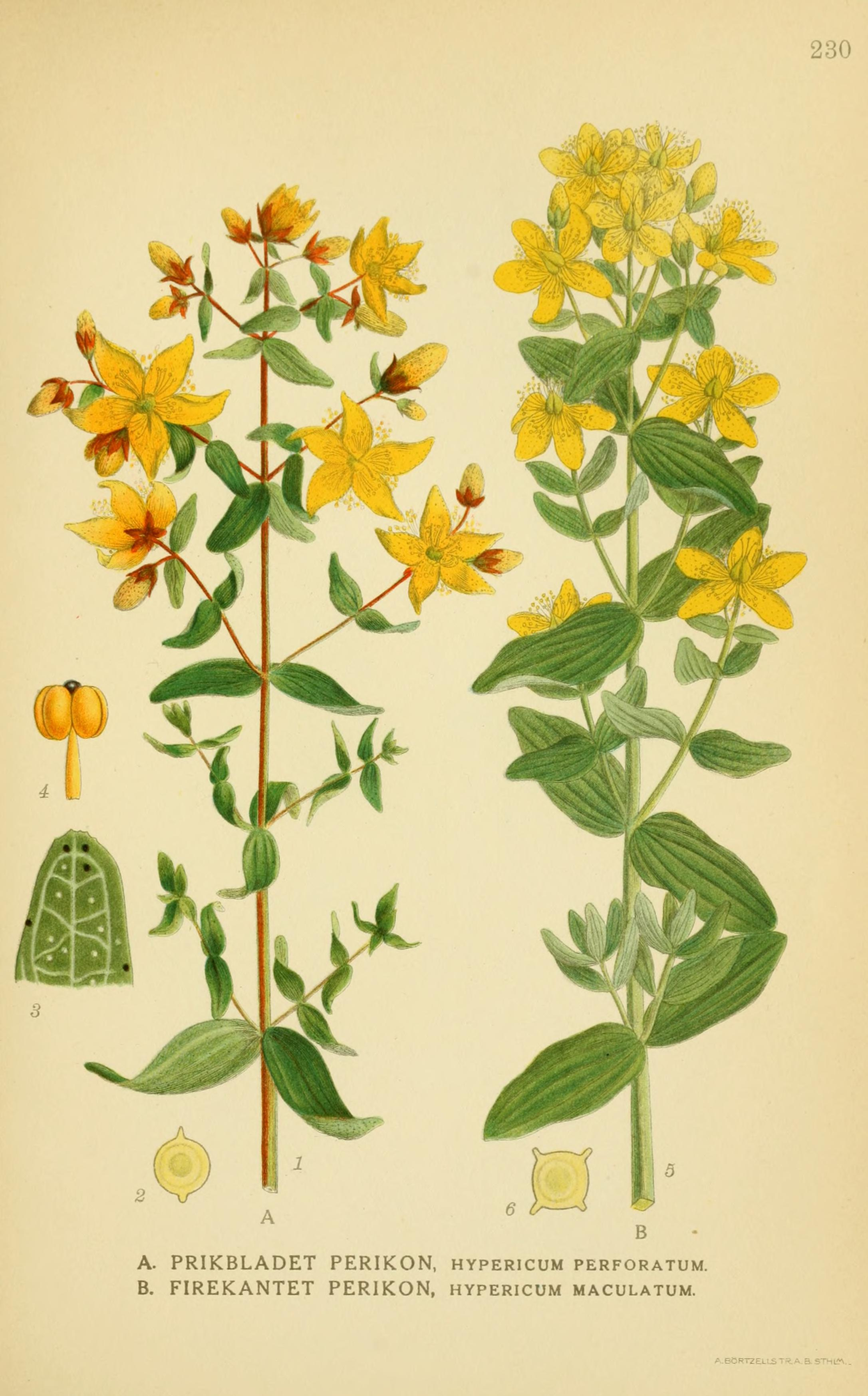 Billeder af nordens flora, ved A. Mentz og C.H. Ostenfeld.